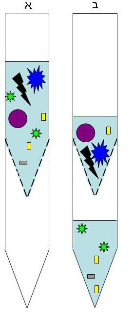 ריכוז חלבונים על ידי פילטר. א. תמיסת חלבונים מונחת בתא העליון של מתקן הריכוז, בין התא העליון לתחתון נמצא פילטר בעל חרירים המאפשרים חדירה של מים מלחים מולקולות קטנות וחלבונים קטנים בלבד. ב. עקב הסירכוז עוברים דרך הפילטר רוב הנוזלים והחלקיקים הקטנים, לעומת זאת החלבונים הגדולים נשארים בדוגמה המרוכזת.